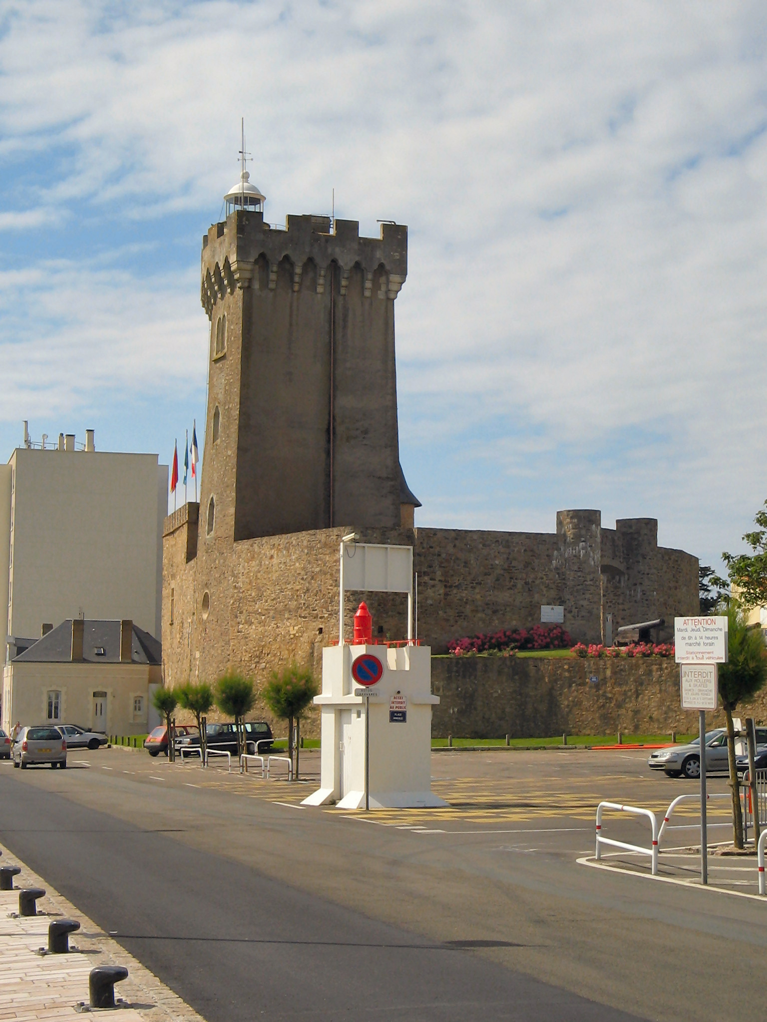 Le Château de la Chaume dit la Tour d'Arundel, situé dans le quartier de La Chaume aux Sables d'Olonne en France